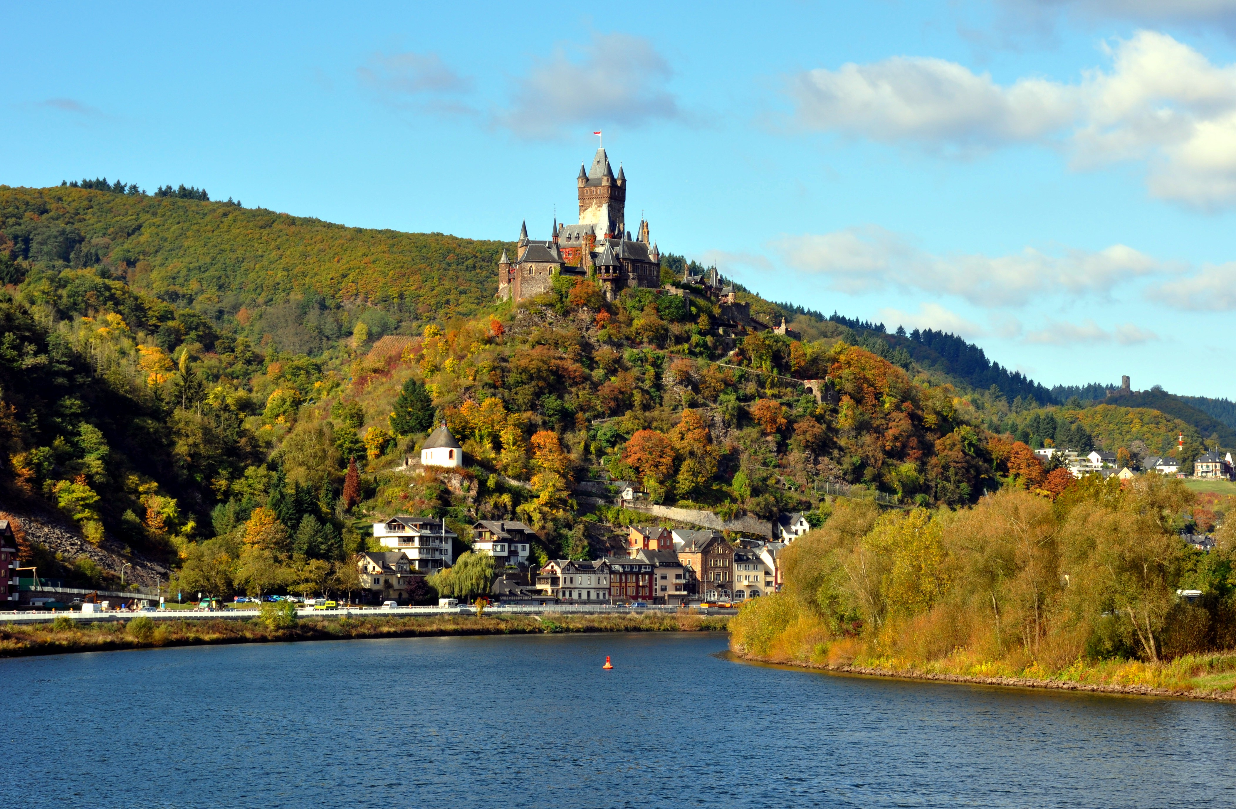 Cochem von Sehl aus betrachtet